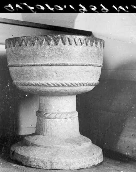 Dopfunt. Kategori: (04) Dopfuntar Dopfunt.